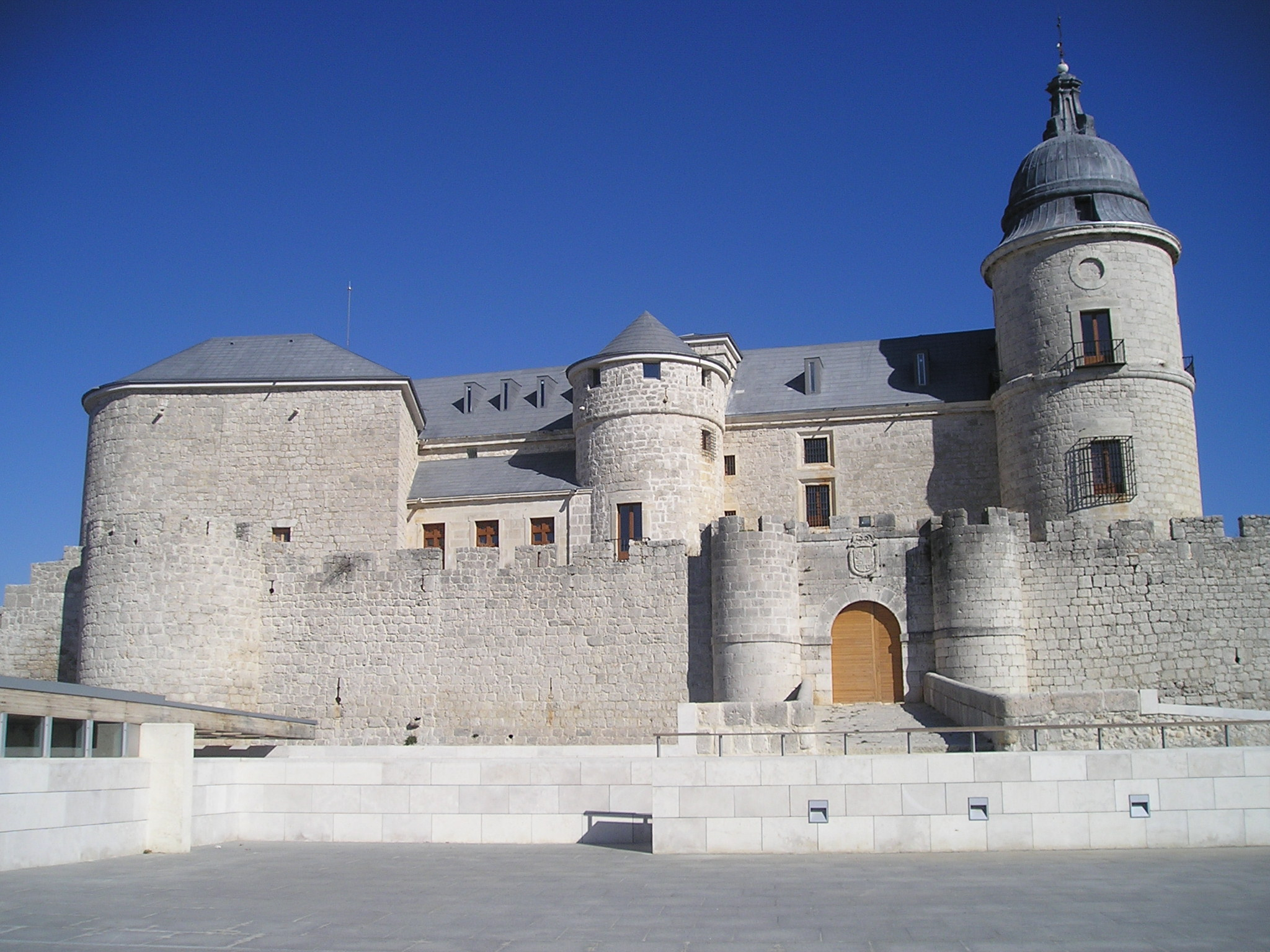 Castillo de Simancas, Valladolid, sede del Archivo General de Simancas.